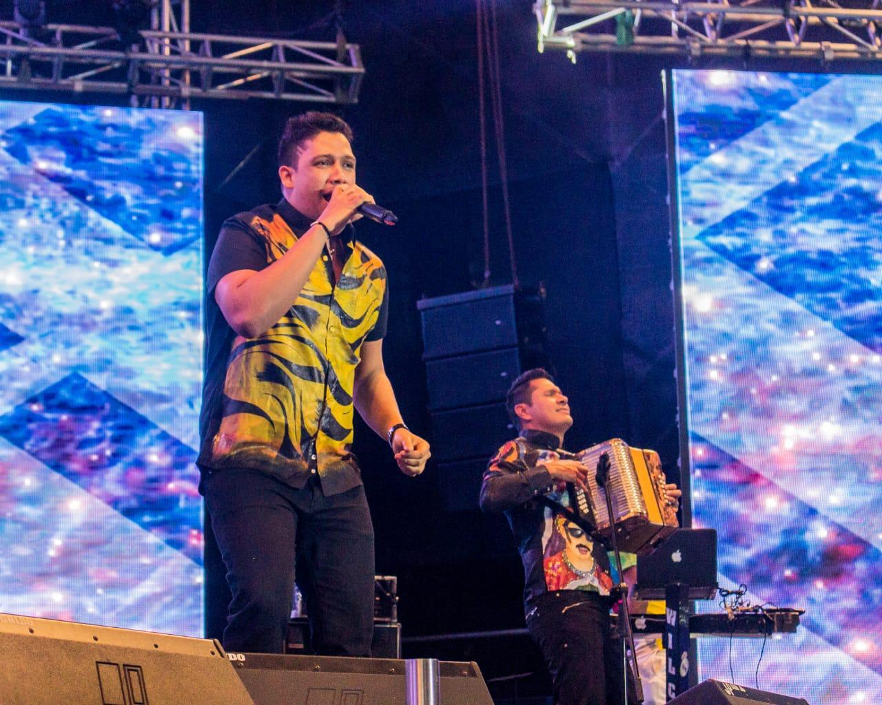 Fello Zabaleta ganador del Congo de oro 2018 del Festival de orquestas en el Carnaval de Barranquilla